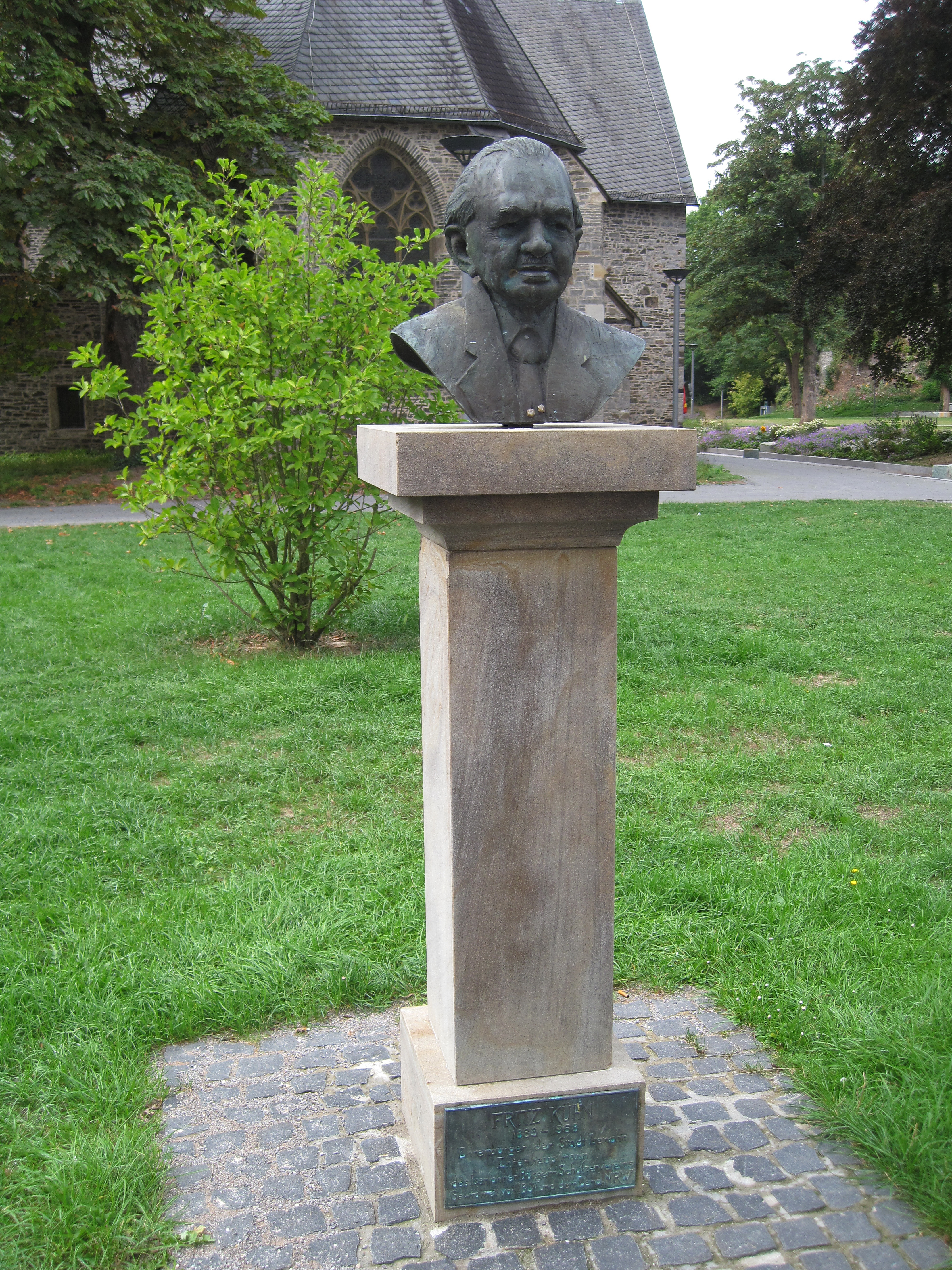 Büste des Autors Fritz Kühn in Iserlohn, Fritz-Kühn-Platz. Künstler: Sandor Navai, Ungarn.